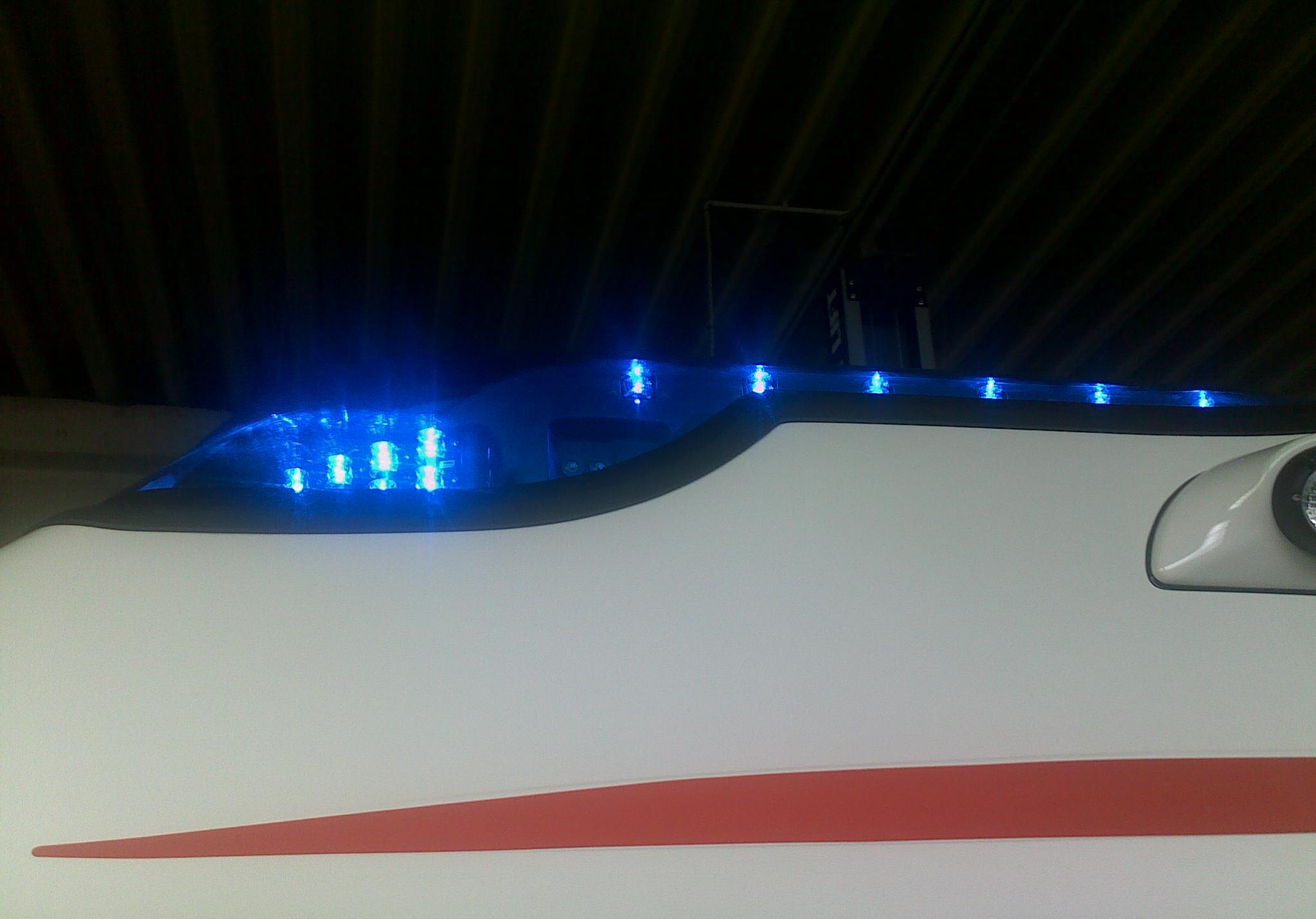 Eine LED-Blaulichtleiste eines Rettungswagens